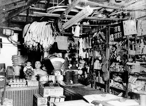 Photo d'un commerce japonais, São Paulo / Foto de comércio japonês, São Paulo.